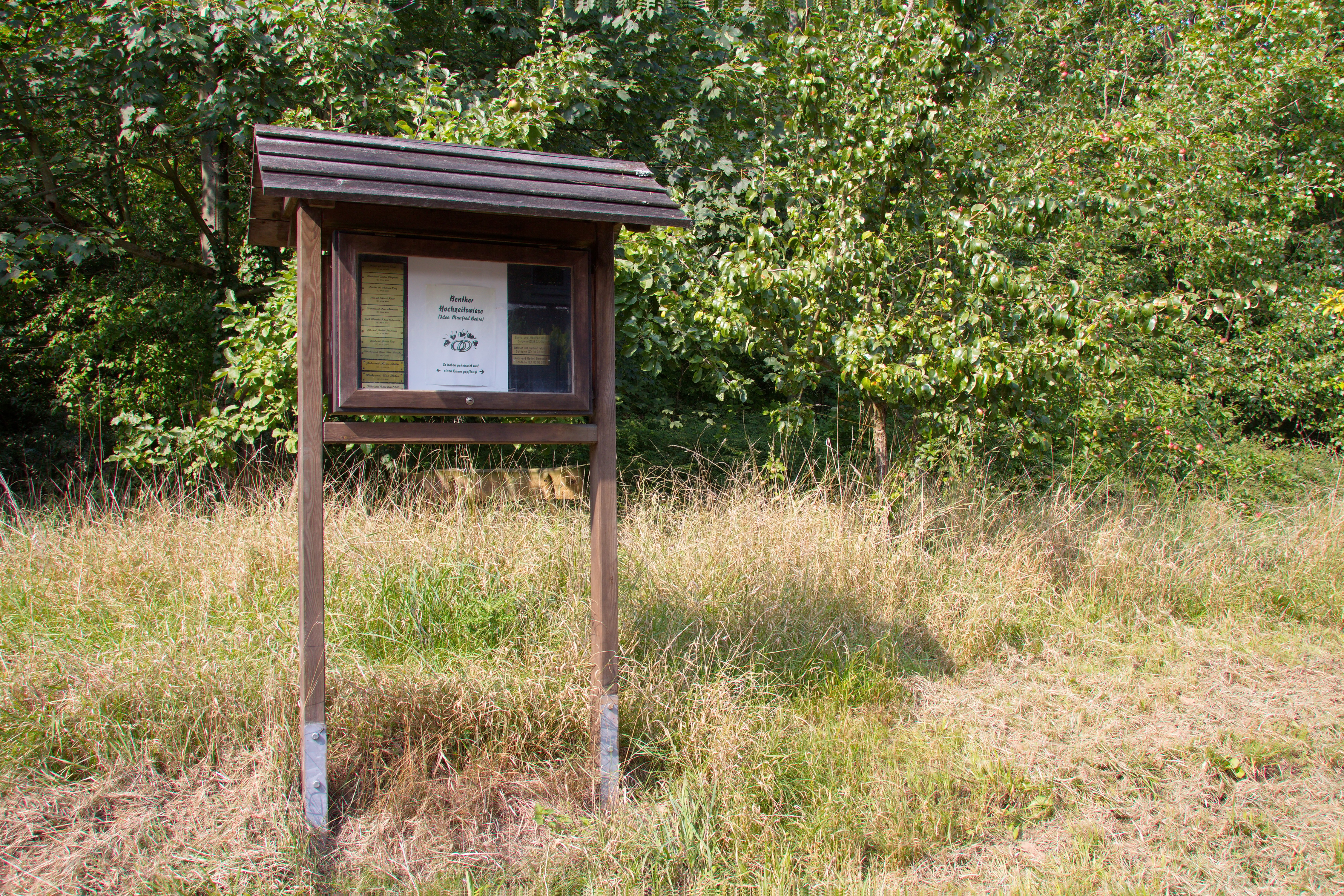 Hochzeitswiese in Benthe am Benther Berg, Niedersachsen, Deutschland